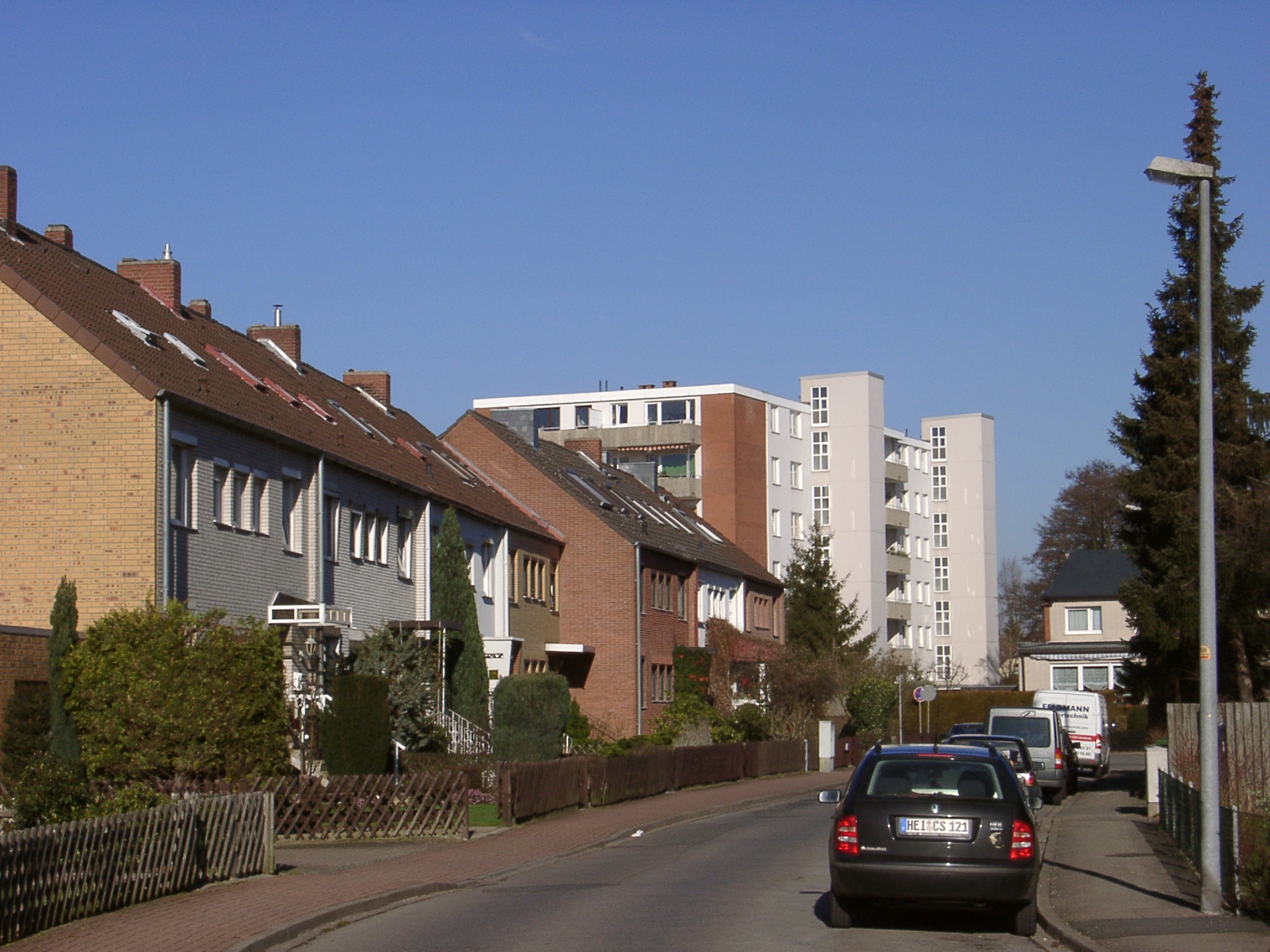 Garbsen - OT Havelse, Langer Acker